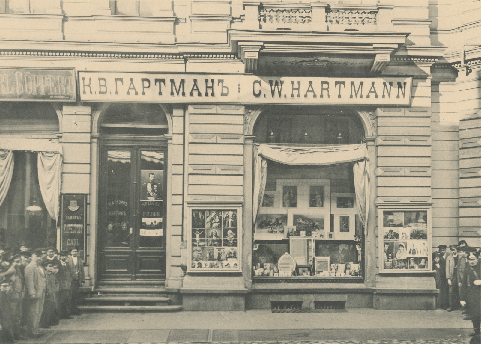 Fotografia przedstawia wystawy sklepowe znajdujące się w kamienicy przy ulicy Piotrkowskiej 11. Kamienica w stylu neorenesansowym została zbudowana na przełomie lat 70. i 80. XIX wieku przez łódzkiego "króla bawełny" Karola Scheiblera. Umieszczono w niej skład firmy, lokale na parterze były wynajmowane na sklepy a pomieszczenia na piętrze na mieszkania. Jednym z takich sklepów był widoczny na zdjęciu sklep oferujący obrazy Karola Hartmana, który prowadził go w latach 90. XIX wieku. Fotografia pochodzi z wydanego w 1896 roku albumu Bronisława Wilkoszewskiego „Widoki m. Łodzi”. Saryusz Bronisław Paweł Wilkoszewski (1847-1901), zwany "łódzkim Canaletto" był mistrzem fotografii ilustracyjnej. Udokumentował zabudowę Łodzi z końca XIX wieku przede wszystkim wille, fabryki, budynki użyteczności publicznej, obiekty sakralne, ulicę Piotrkowską. Jego zakład fotograficzny znajdował się w willi "Trianon" w Pasażu Meyera 5 (obecnie ulica Moniuszki).